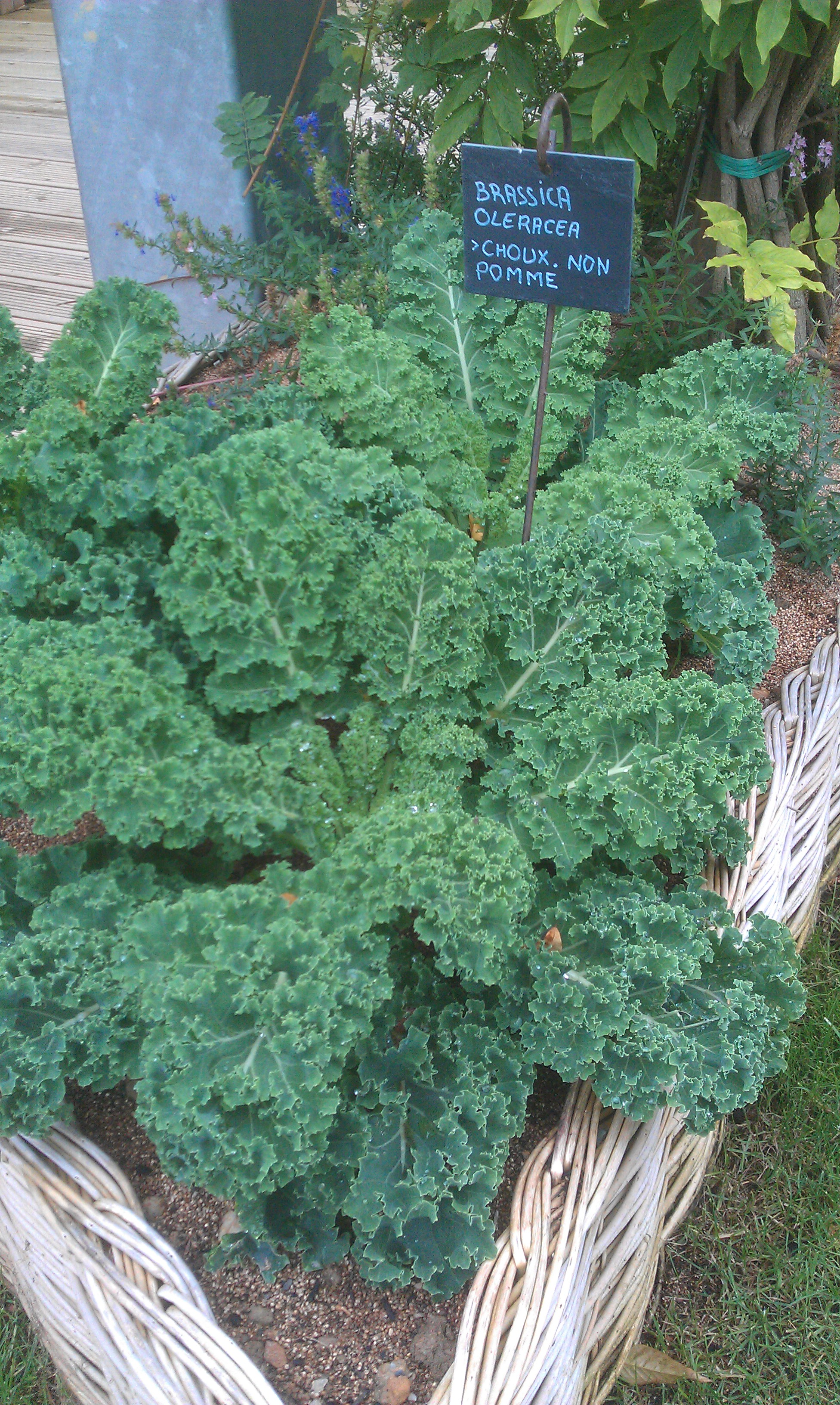 Choux non pomme à Terra Botanica